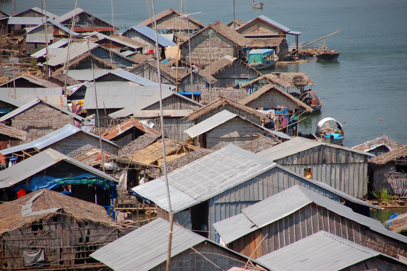 Kompong Cham, Cambodia